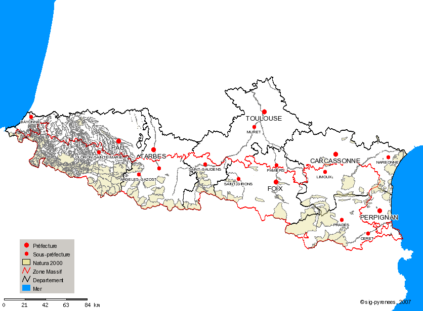 Carte de localisation des sites Natura 2000 dans les Pyrénées